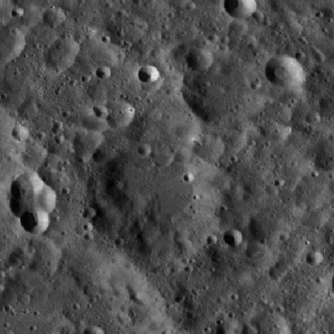 Cráter lunar Florensky. (Imagen LROC)